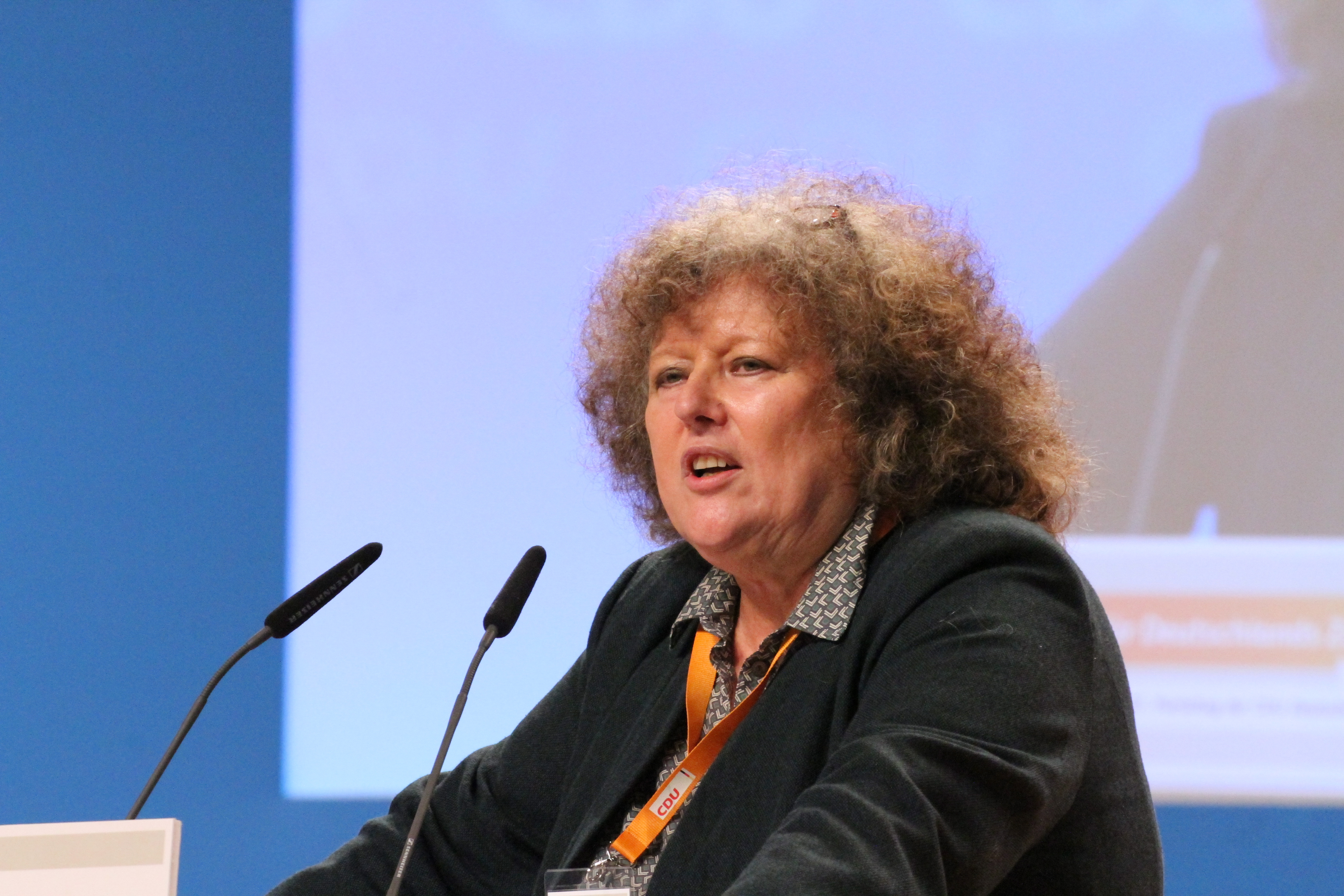 Regina Görner auf dem CDU Bundesparteitag Dezember 2014 in Köln